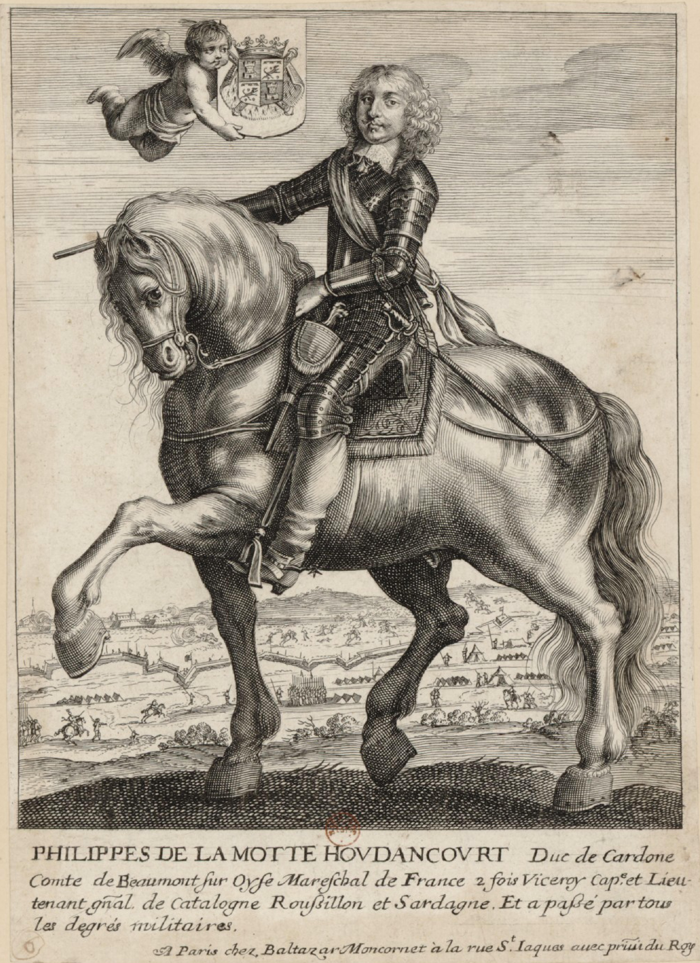 Philippe de La Motte Houdancourt (1605–1657), duc de Cardone, maréchal de France